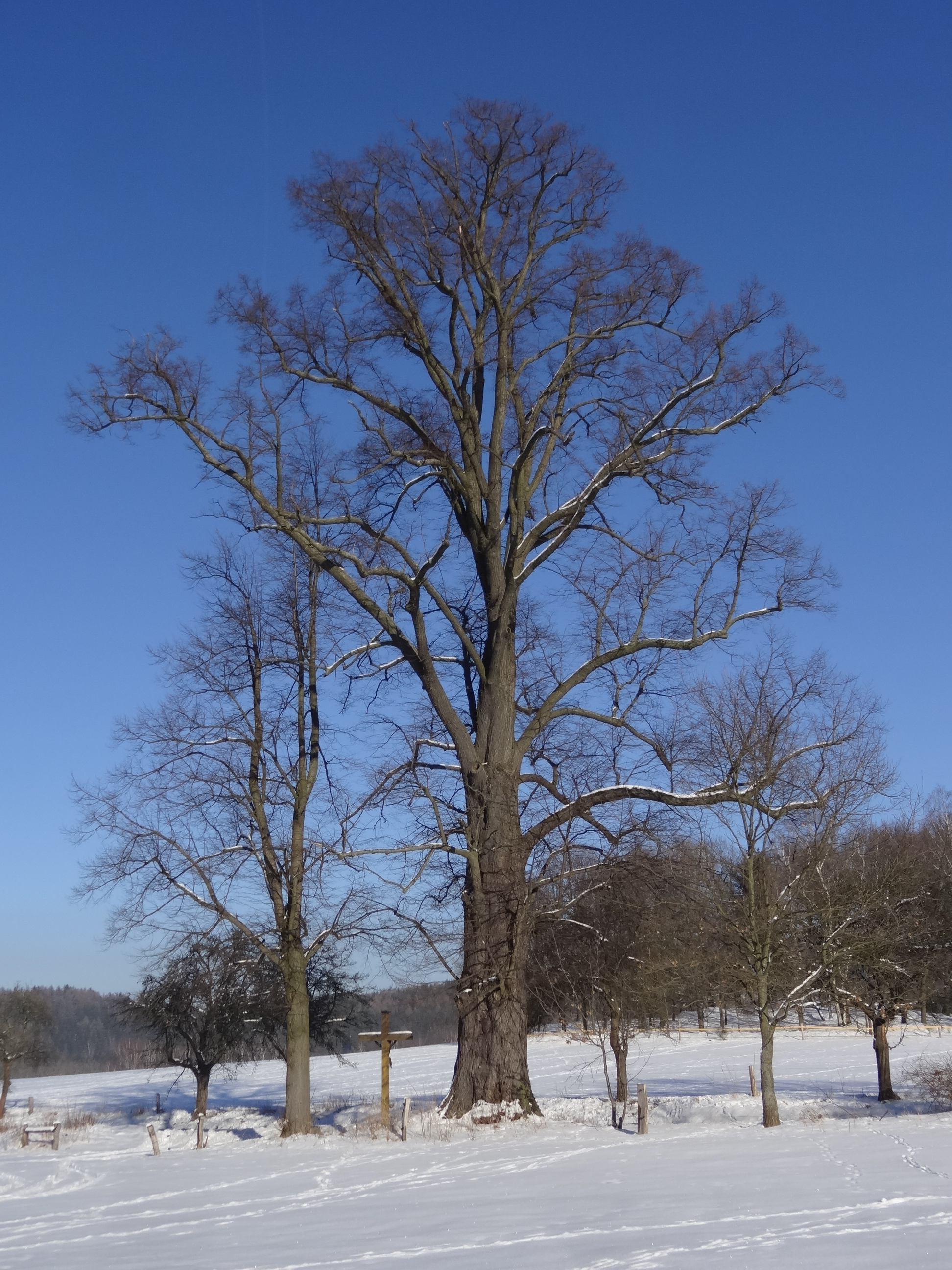 Poustka - památná lípa srdčitá ve volné krajině jižně od vsi, západně od silnice do Frýdlantu